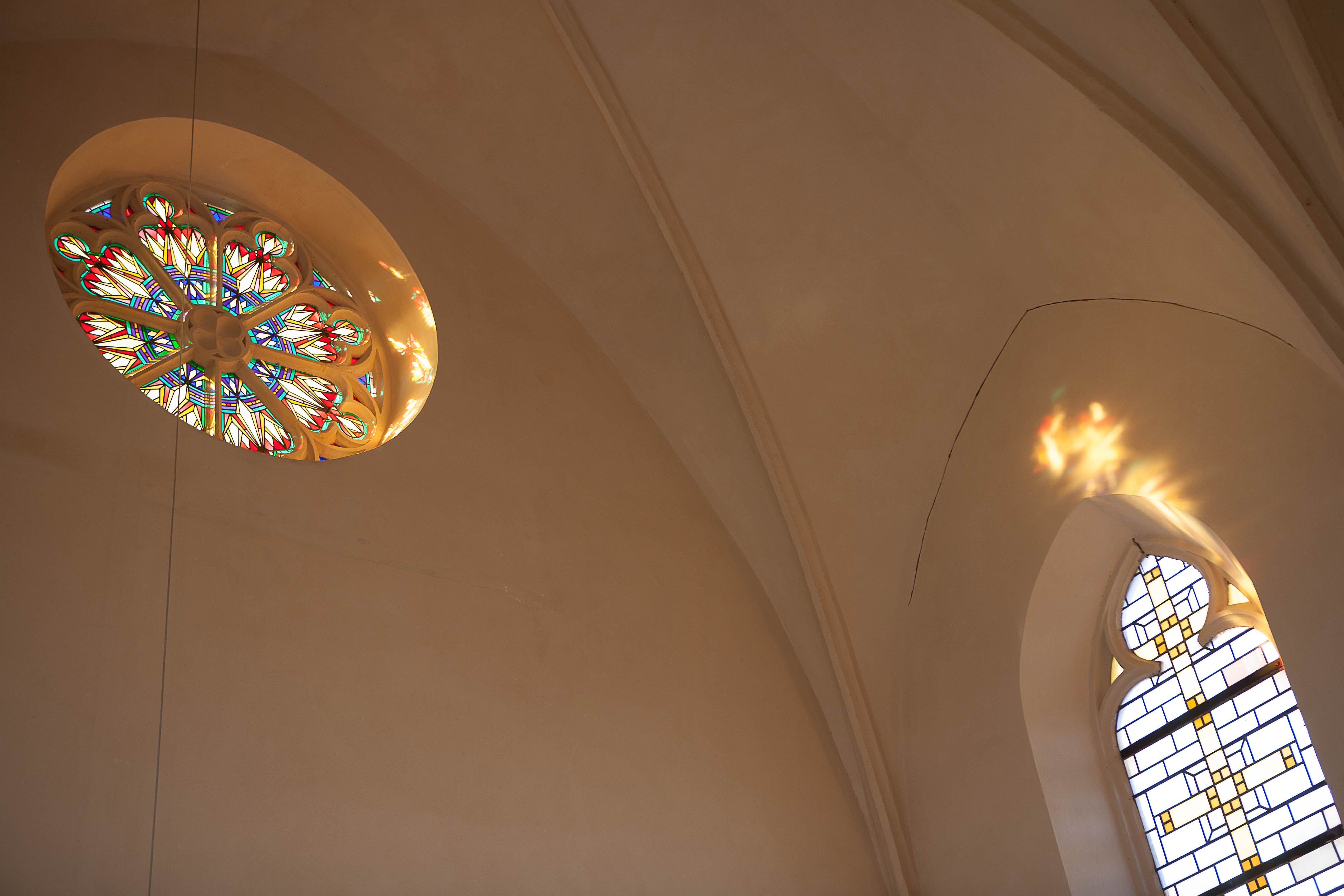 Maßwerkrosette2 in der Kirche St. Markus (Minkelfeld) nach der Renovierung 2019